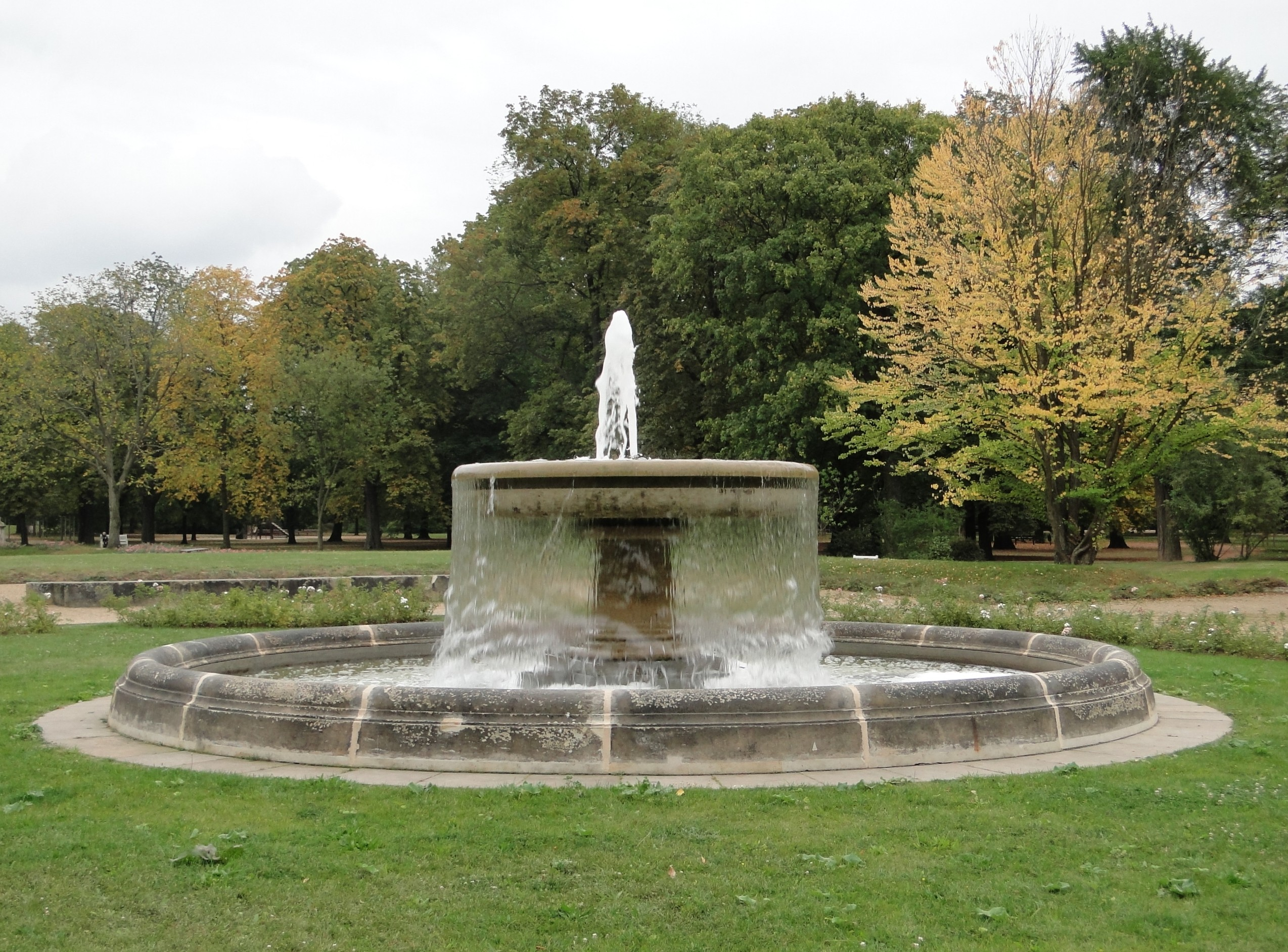 Brunnen, Hauptachse Blüherpark, in Dresden